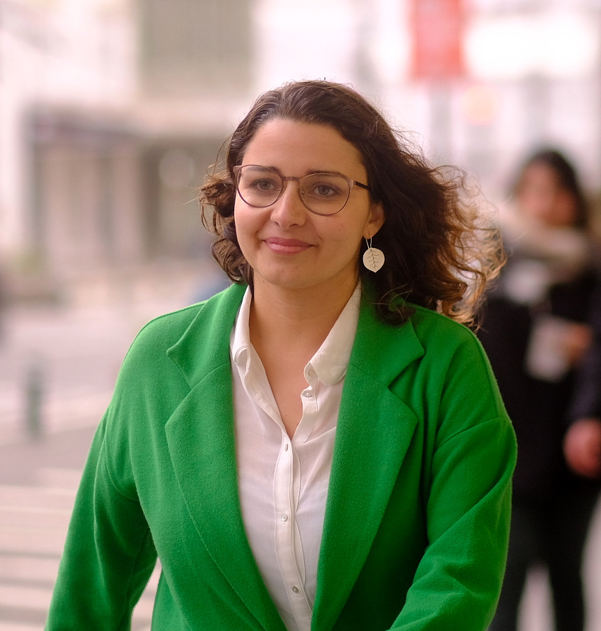 La política chilena Carla Amtmann camina por el centro de la ciudad de Valdivia. Recorte de la foto original.